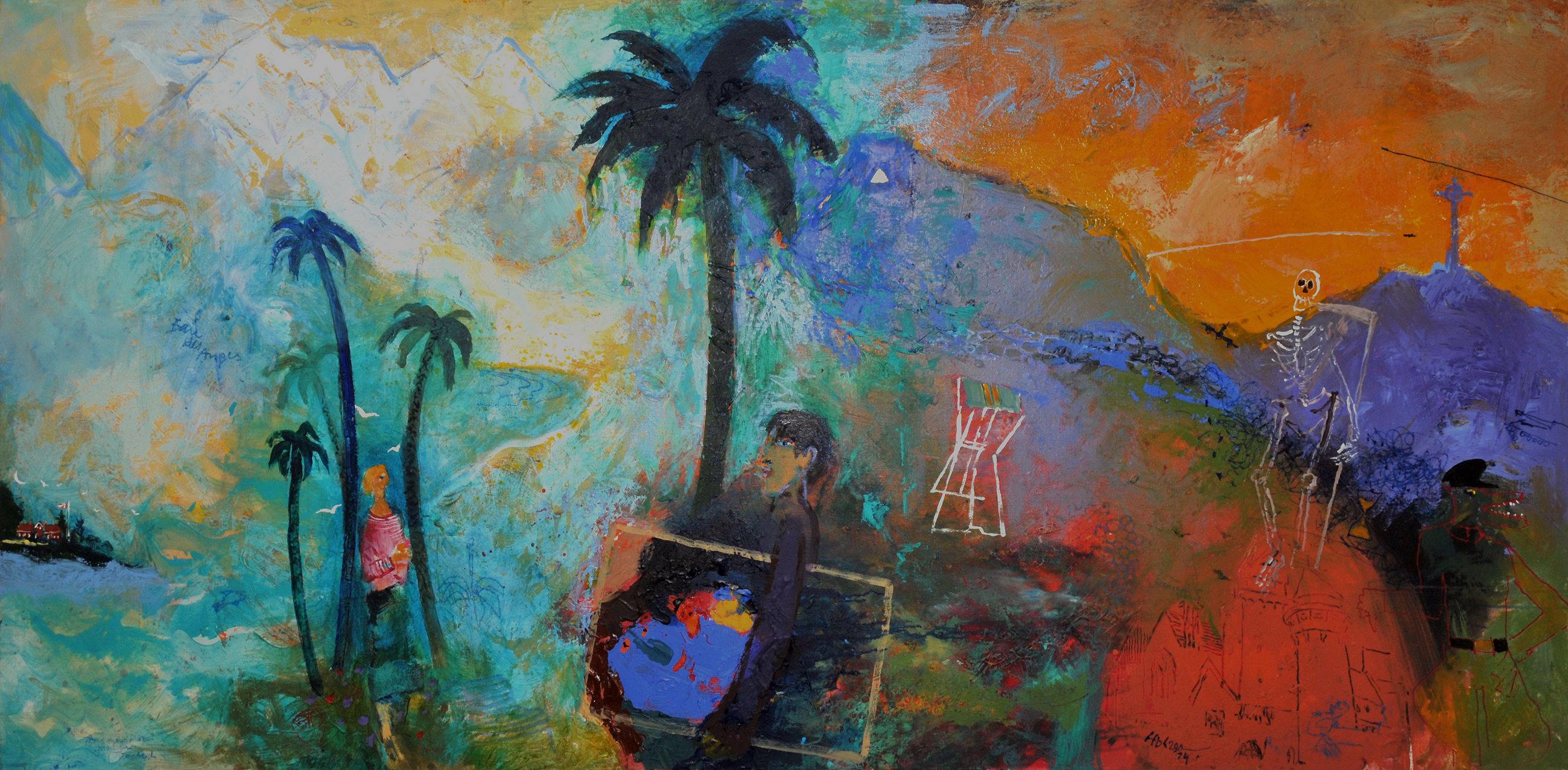 Bei der Maturareise lernte Adi Holzer 1955 in Nizza seine Frau, die dänische Medizinstudentin und spätere Kinderärztin Kirsten Inger Mygind, kennen, die von ihm nach ihren Initialen Kim genannt wird. Adi Holzer stammte aus Österreich und Kirsten Inger Mygind aus Dänemark. Sieben Jahre lang arbeiteten beide für ihr Studium und für ihren Berufsabschluss. Adi Holzer studierte in den Jahren 1955–1960 an der Akademie der bildenden Künste Wien bei den Professoren Robin Christian Andersen und Herbert Boeckl. Er schloss sein Studium 1960 mit dem Diplom für Malerei ab. Anschließend arbeitete er 1960–1962 in Kärnten als Kunsterzieher am Bundesrealgymnasium Klagenfurt am Völkermarkter Ring. In diesen beiden Jahren veröffentlichte er bereits seine ersten Kunstwerke. Kim nutzte die sieben Jahre für ihr Medizinstudium und für den Beginn der medizinischen Laufbahn als Kinderärztin. 1962 heirateten beide in Dänemark. Nach den Flitterwochen im südlichen Österreich übersiedelte Adi Holzer zur gemeinsamen Wohnung in Hareskovby im Nordwesten von Kopenhagen. Adi Holzer widmete sich nun ganz seiner künstlerischen Laufbahn. Auf der rechten Seite des Bildes macht Adi Holzer aufmerksam auf die politische Situation in Österreich, die bis zum Jahr 1955 bestand. Österreich wurde nach dem zweiten Weltkrieg von den Siegermächten besetzt und in Besatzungszonen aufgeteilt. Auf diese Besatzungszeit in Österreich weist Adi Holzer mit dem zur Bestie mutierten Besatzungssoldaten und dem Tod als damalige Bedrohung in der russischen Besatzungszone hin. Das helle Dreieck am Berghang weist hin auf die Anwesenheit des dreieinigen Gottes als Gott Vater, Gott Sohn (Jesus Christus) und Heiliger Geist. Entstehung von "Begegnung in Nizza" im Jahr 2014. Die Fotografie entstand am 8. Mai 2016.